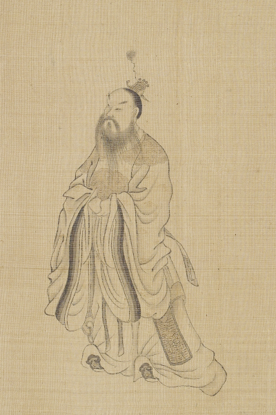 Changsun Wuji